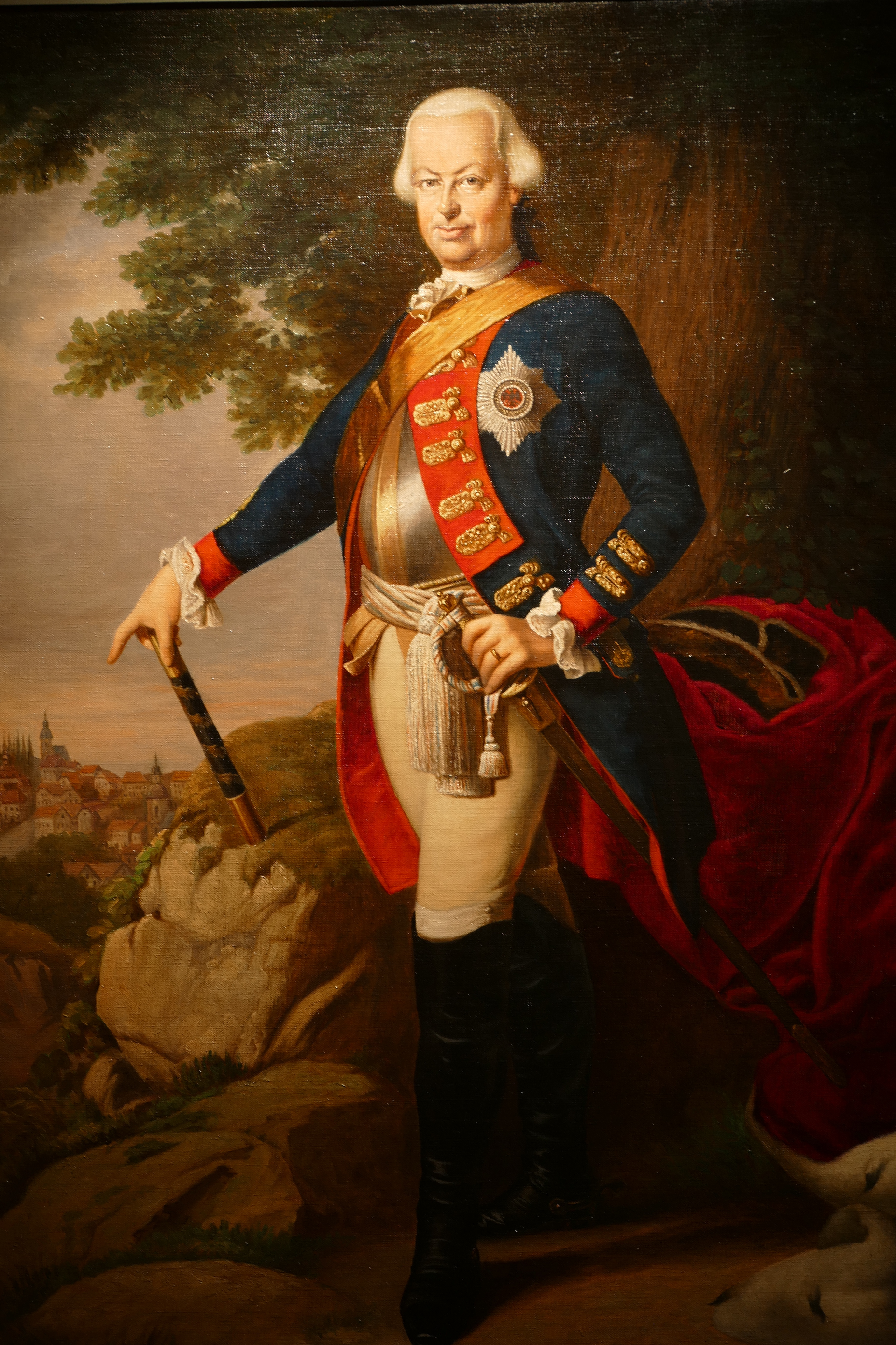 Alsace, Bas-Rhin, Bouxwiller, Musée du Pays de Hanau, Tableau "Louis IX de Hesse-Darmstadt ?".